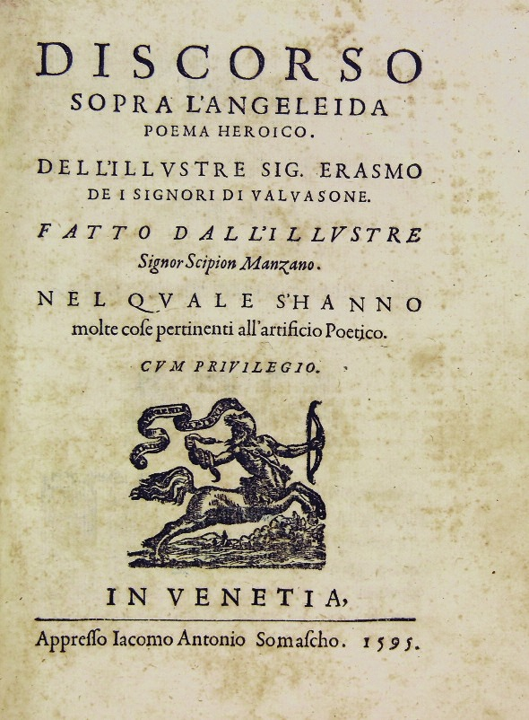 Scipione di Manzano Discorso sopra l'Angeleida - 1595 - Venezia